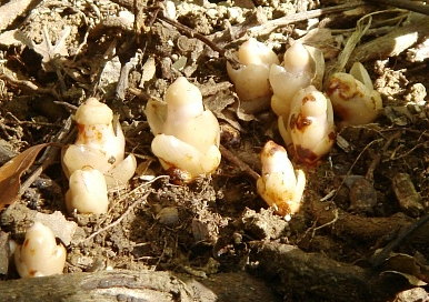 何人ものやっこさんが踊っているようです